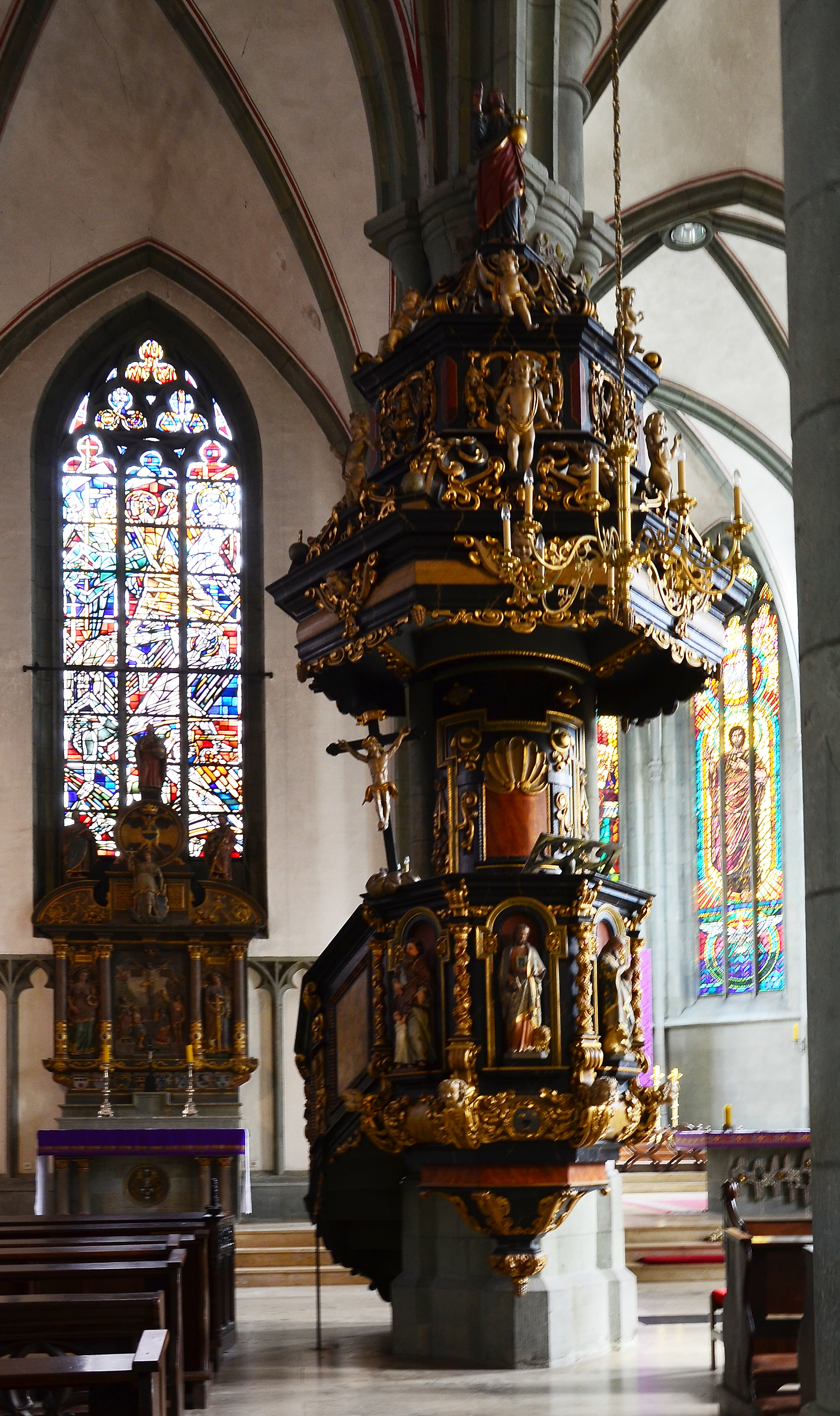 denkmalgeschützte Propsteikirche, Blick auf die Kanzel